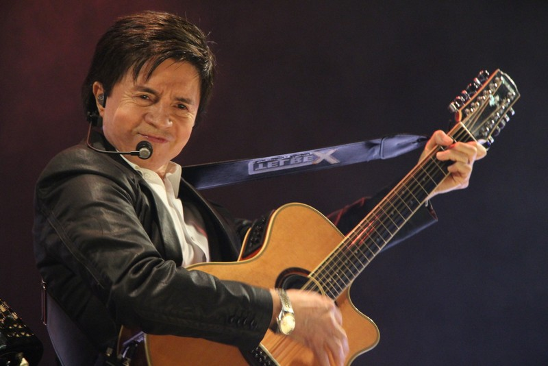 Chitãozinho e Xororó-007